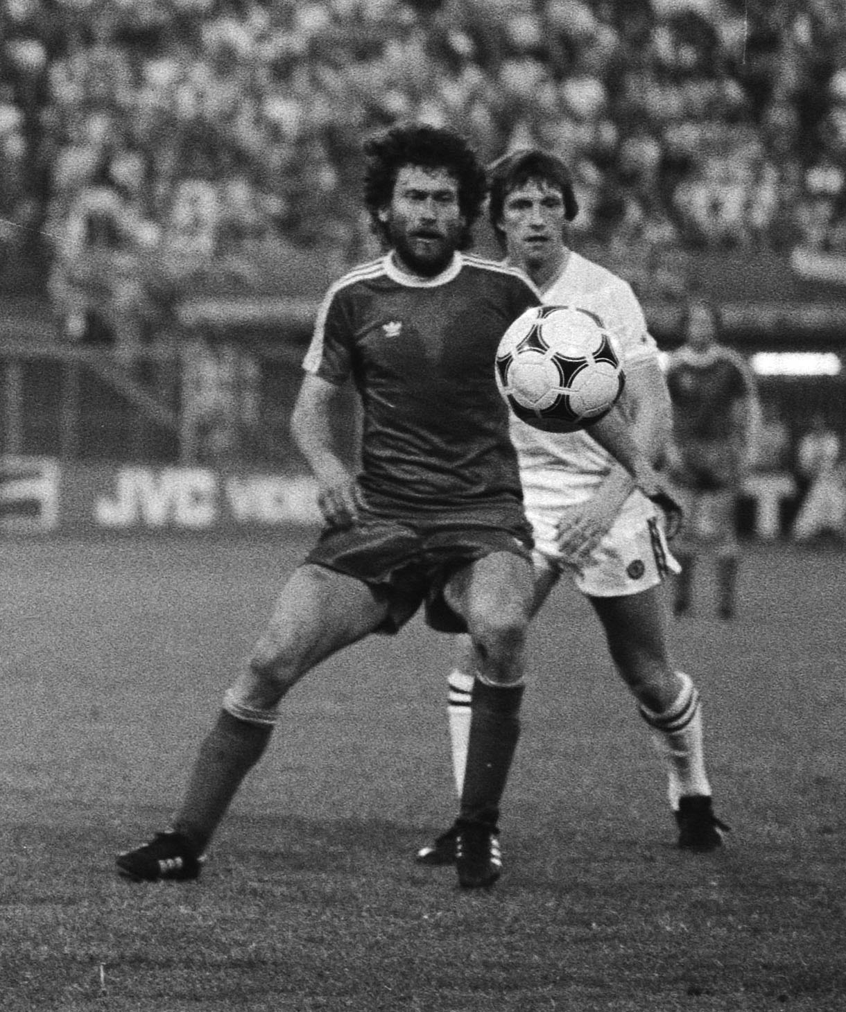 Rotterdam, 26 mei 1982. FC Bayern Munchen tegen Aston Villa 0-1 Europa Cup I; Breitner in aktie.